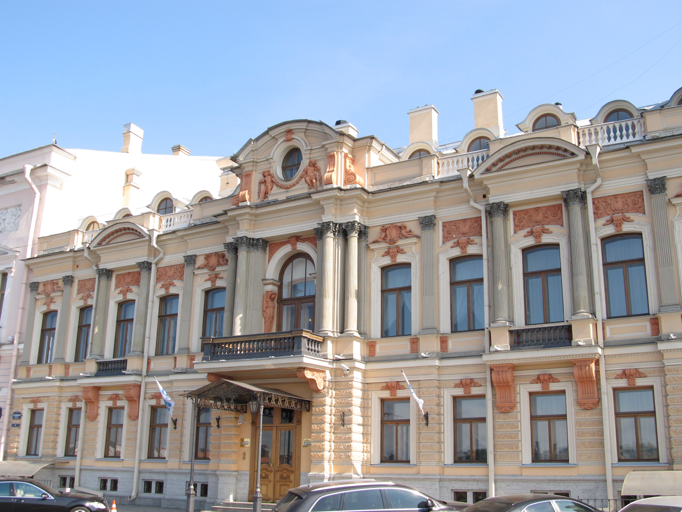 Дом Казалета (Тенишевой), Санкт-Петербург, Английская наб., 6/Галерная ул., 5